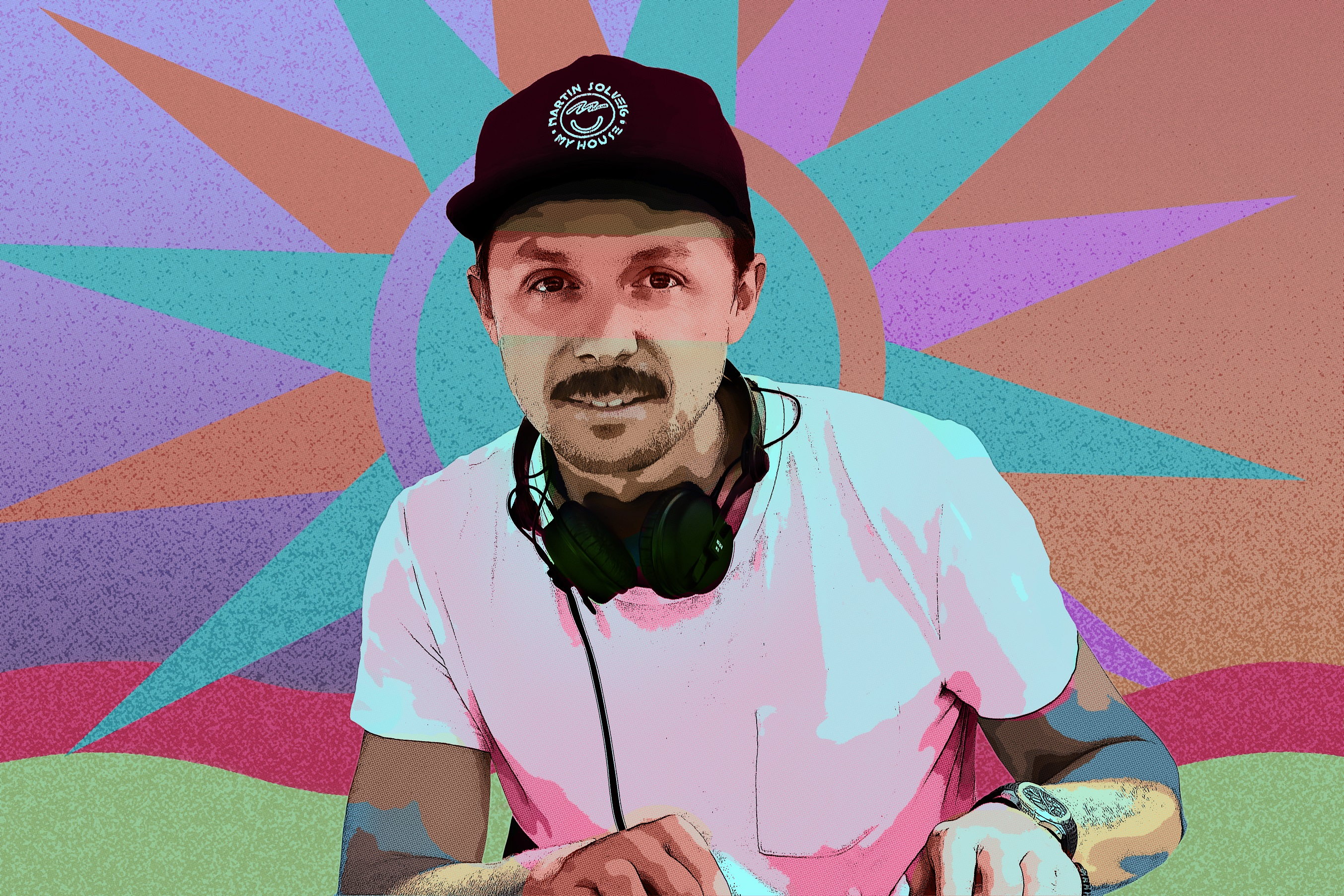 Pop Art du portrait de Martin Solveig réalisé à St Tropez par Gil Zetbase